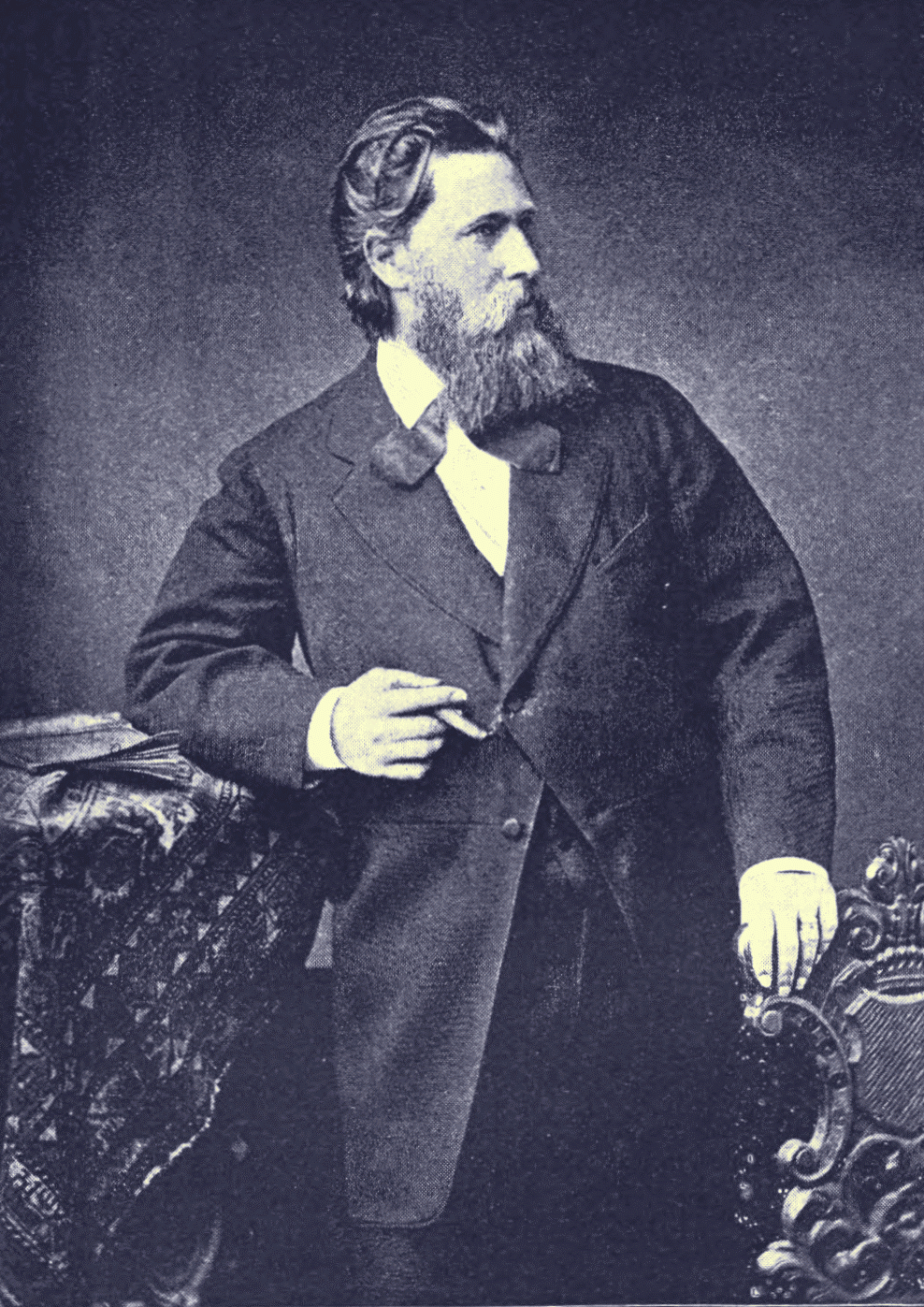 Karl Stieler (1842-1885), German writer